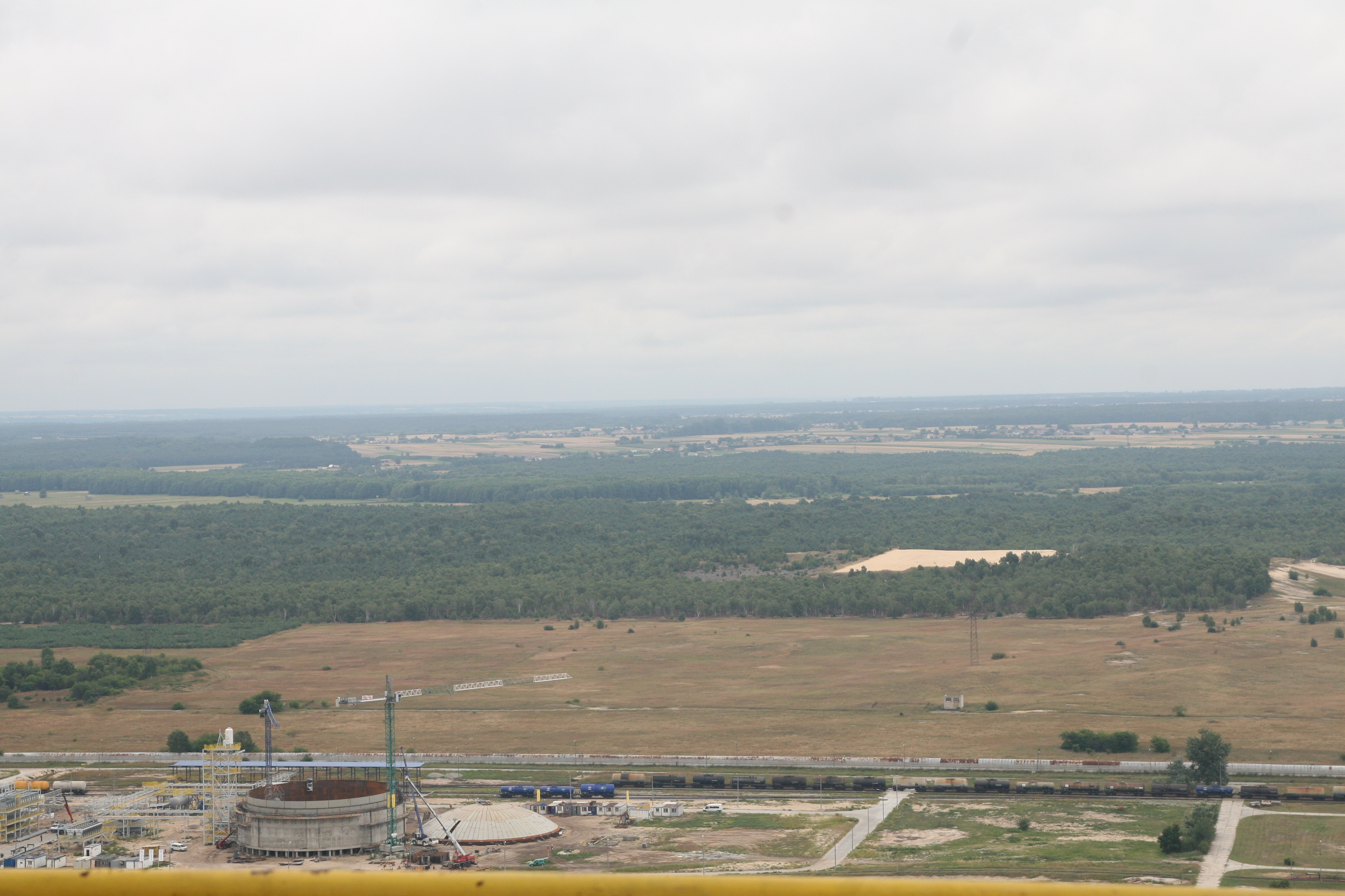 Widok z wieży - Instalacje produkcyjne w Grupie Azoty Zakładach Azotowych "Puławy" S.A.